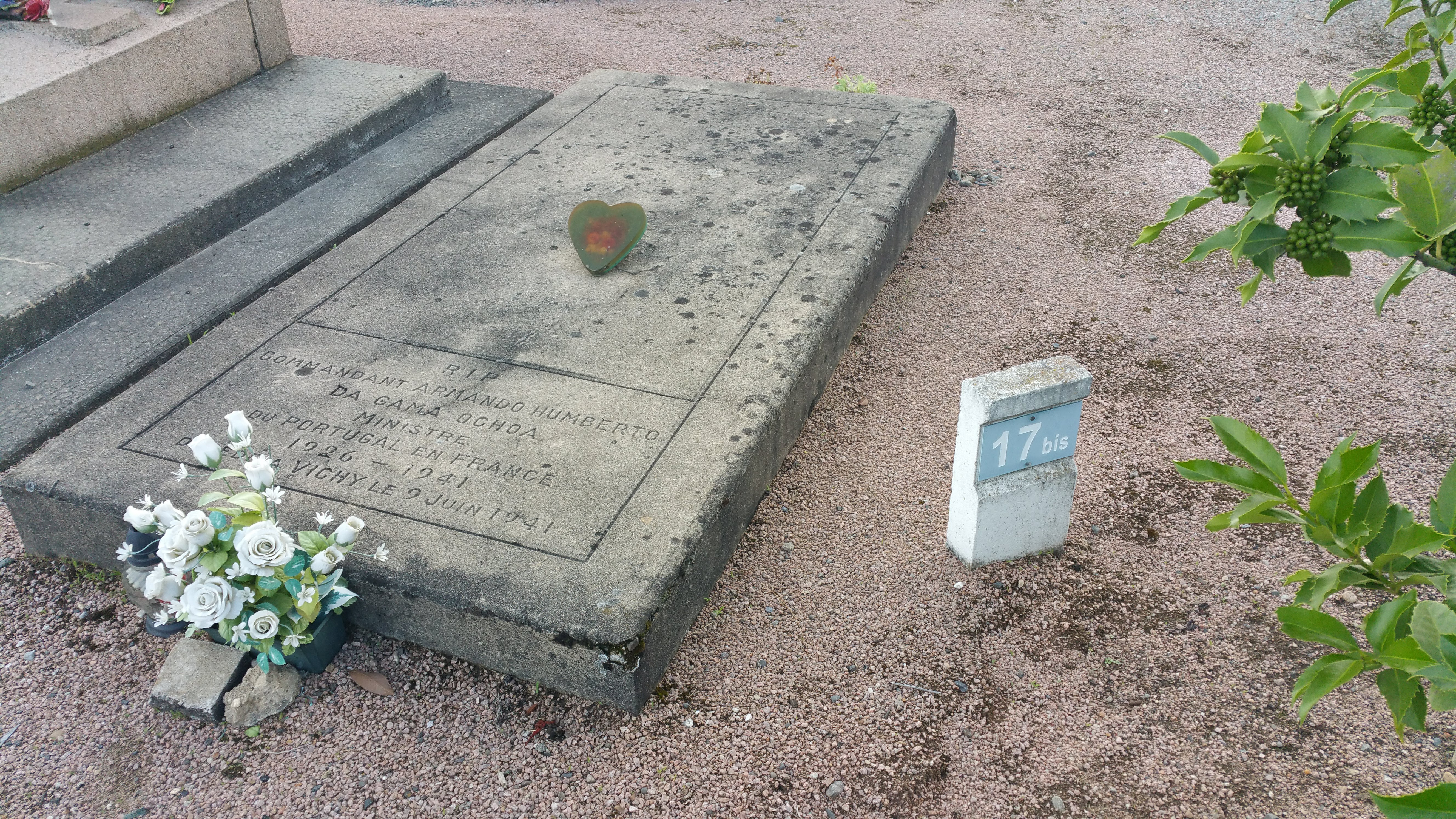 Tombe du commandant Armando da Gama Ochoa, ministre des affaires étrangères puis ambassadeur du Portugal en France (1926-1941) et mort à Vichy le 9 juin 1941. Cimetière de Vichy, carré 17 bis, angle nord-est.